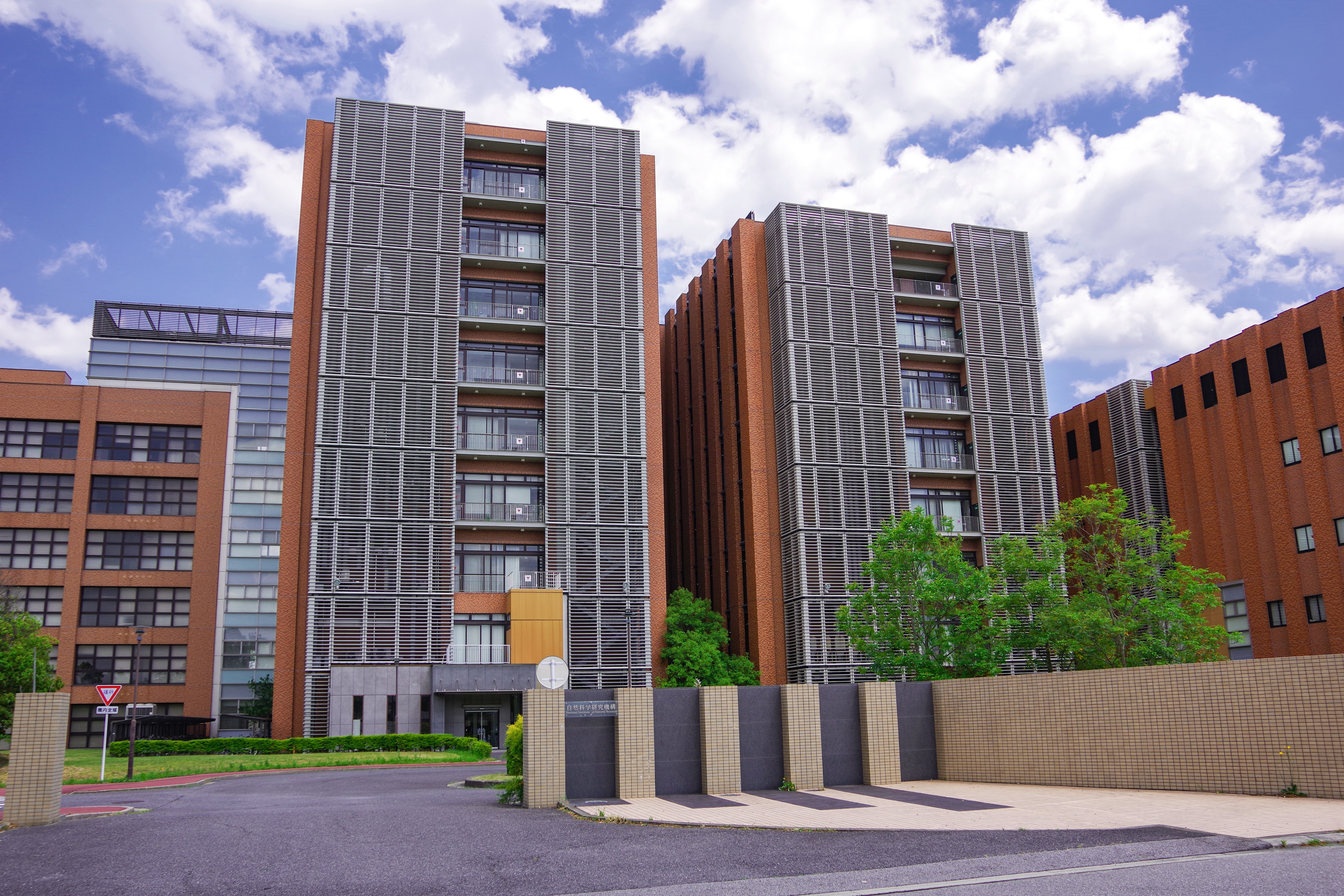 生命創成探究センター